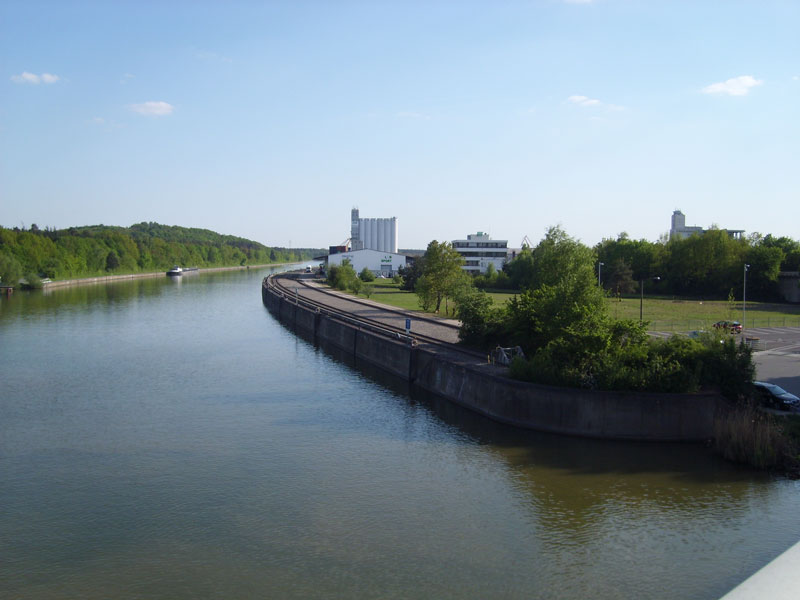 Hafen Nürnberg (Brücke)